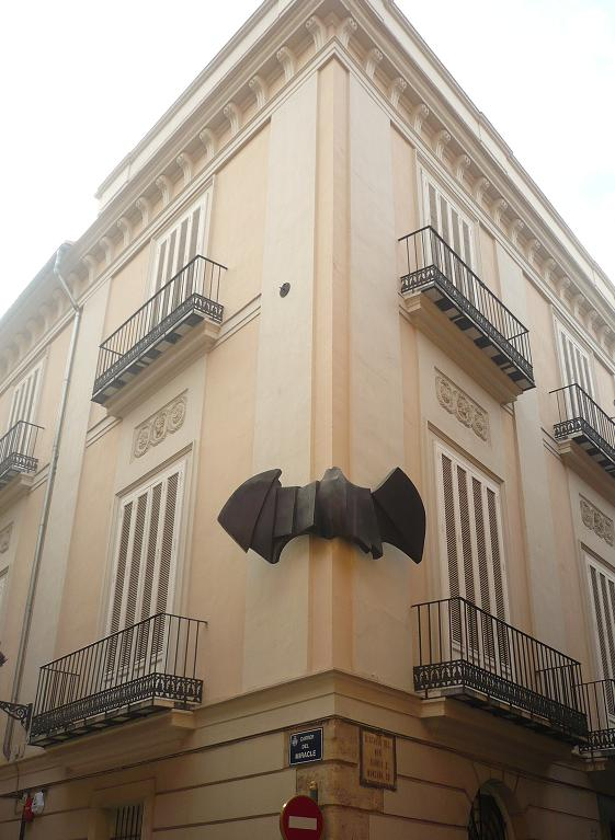 Sede de Lo Rat Penat en Valencia (España). La escultura del gran murciélago de la esquina es obra del escultor Nassio Bayarri.